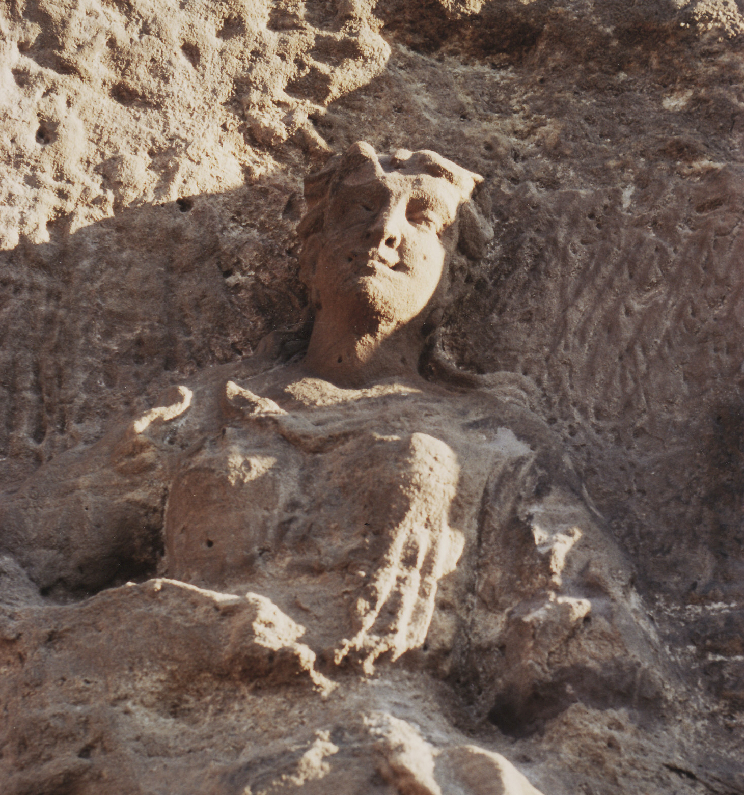 Großjena, Steinauerscher Weinberg, Steinernes Album, Felsrelief, Detail